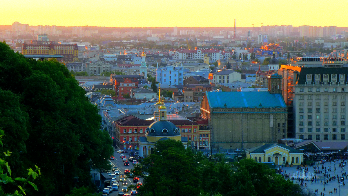 Фото зроблене з оглядового майданчика в Хрещатому парку м. Києва 20.05.2017 20:28